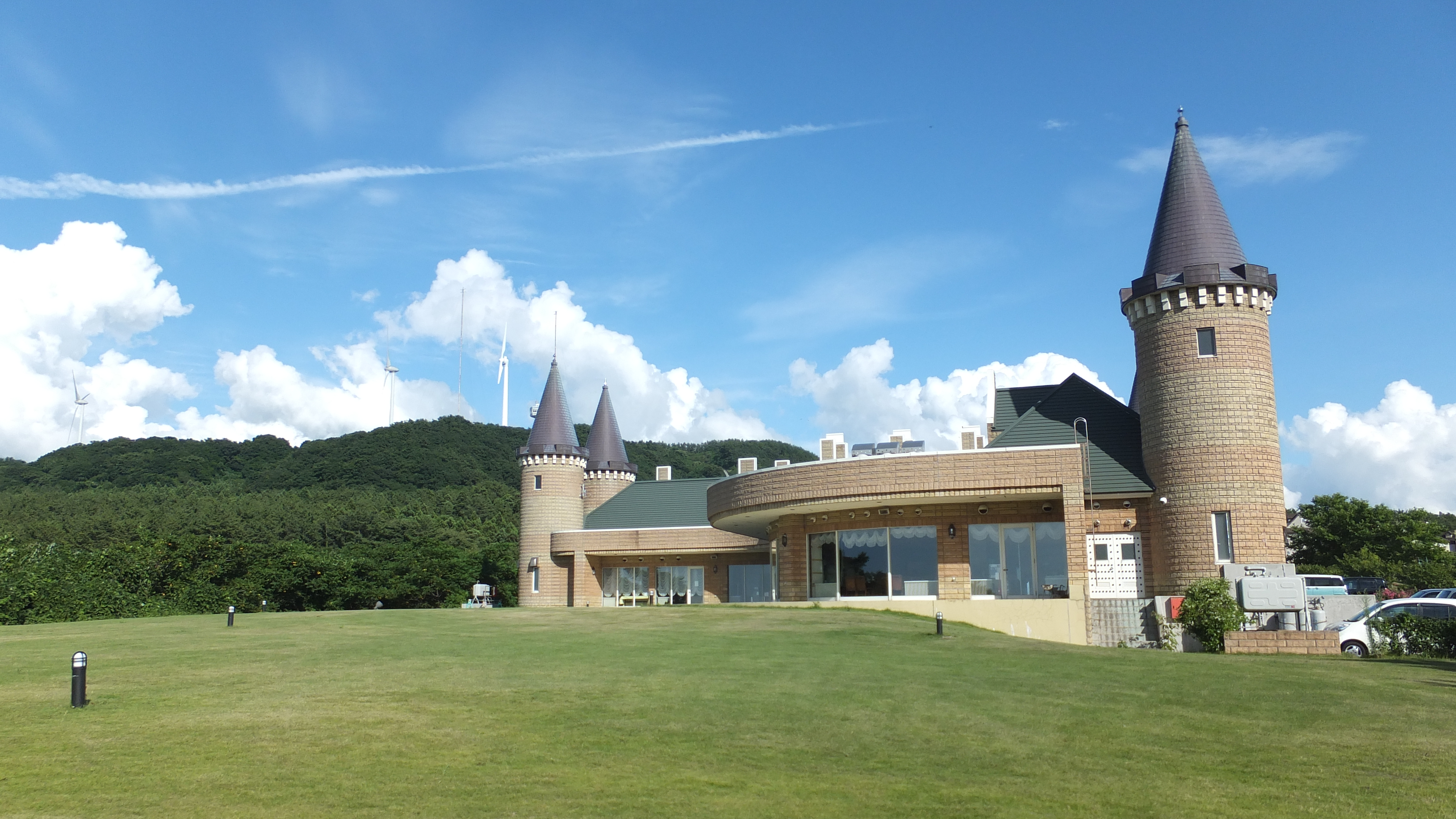 ウェスパ椿山のレストラン「カミリア」より、風車の丘を望む。